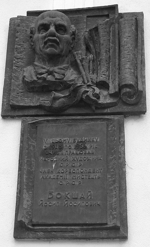 Мемориальная плита Иосипу Иосиповичу Бокшаю (1891—1975) — украинскому советскому живописцу, народному художнику СССР в Ужгороде